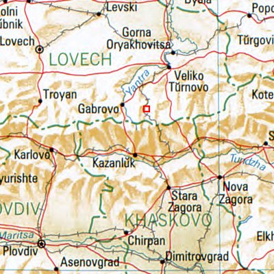 Trjawna - Lage des Ortes in Bulgarien